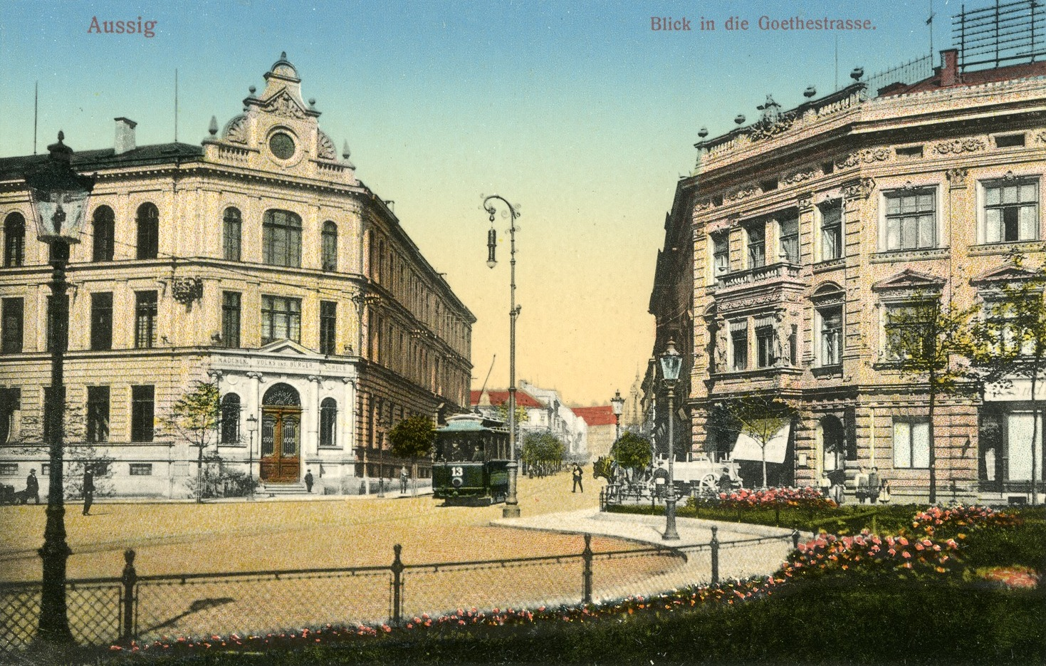 Aussig; Goethestraße mit Straßenbahn This postcard is from publisher Brück & Sohn in Meißen ( This postcard has a unique number 12762 and is available in a higher resolution at the publisher. This images was uploaded in a cooperation project between Wikipedians and the publisher.